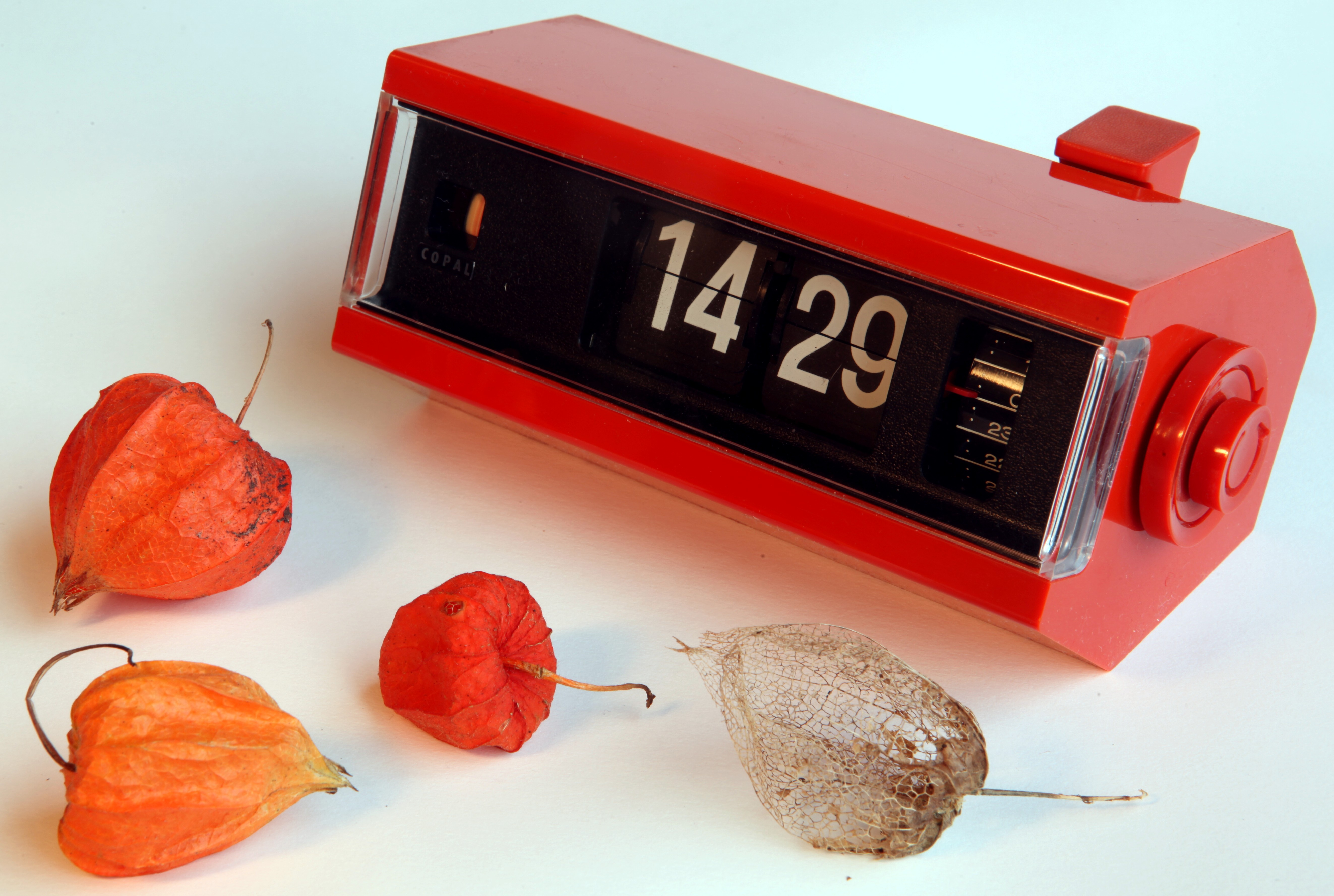 Copal japan 1970s Alarm flip number electric clock